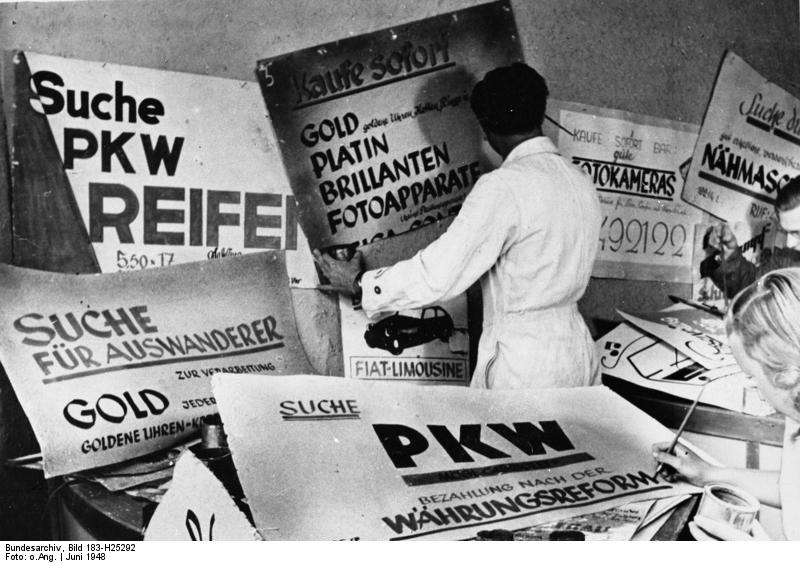 Die Wirtschaft in den Westsektoren von Berlin und in Westdeutschland richtet sich für den Tag der Währungsreform ein. UBz: Werbegraphiker bei der Arbeit an ihren neuen Plakaten. Zentralbild/dpd 17-6-48 1667-48